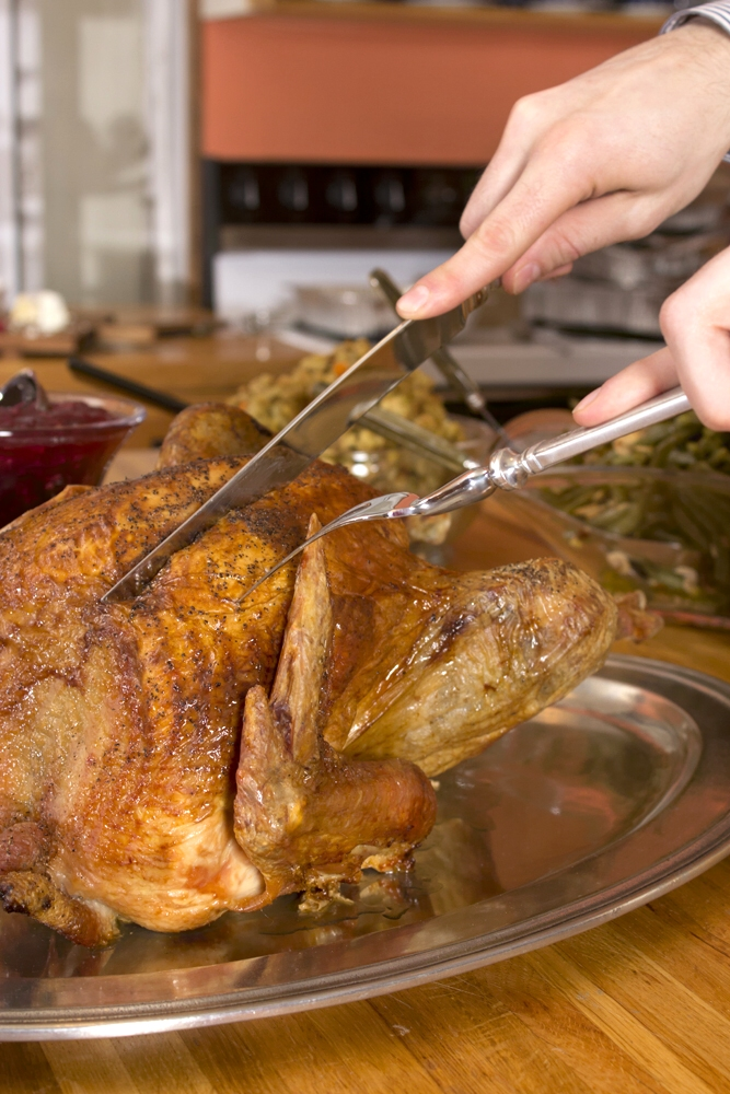 Tranchieren eines gebratenen Truthahns bei einem Thanksgiving-Essen, hier mit Hilfe eines (in Italien handgeschmiedeten) Tranchierbestecks der Marke Match Pewter des US-amerikanischen Unternehmens Match Inc.